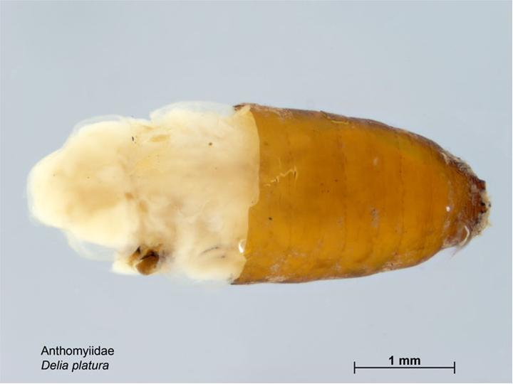 Delia platura pupa.